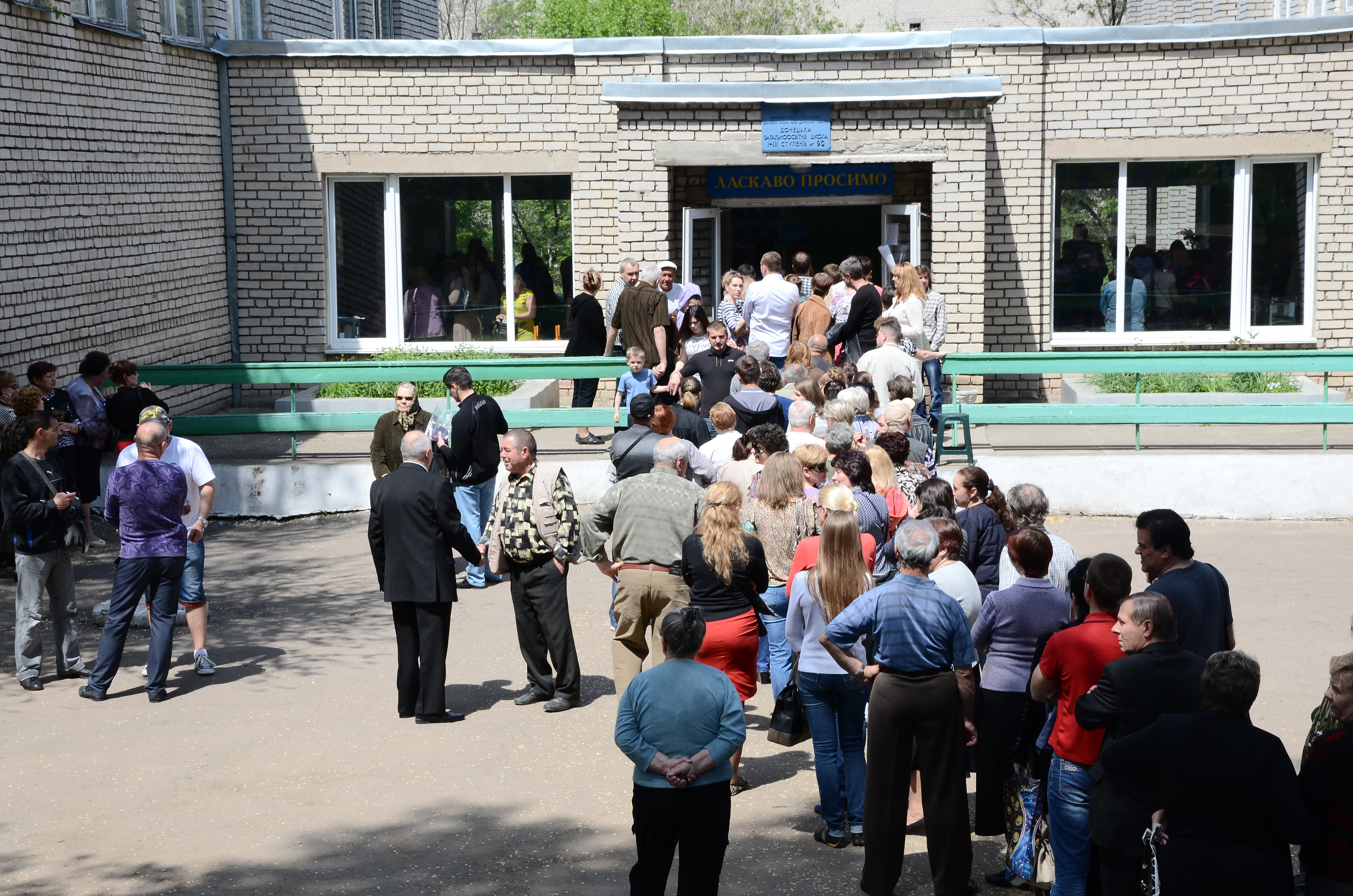 Референдум в Донецке